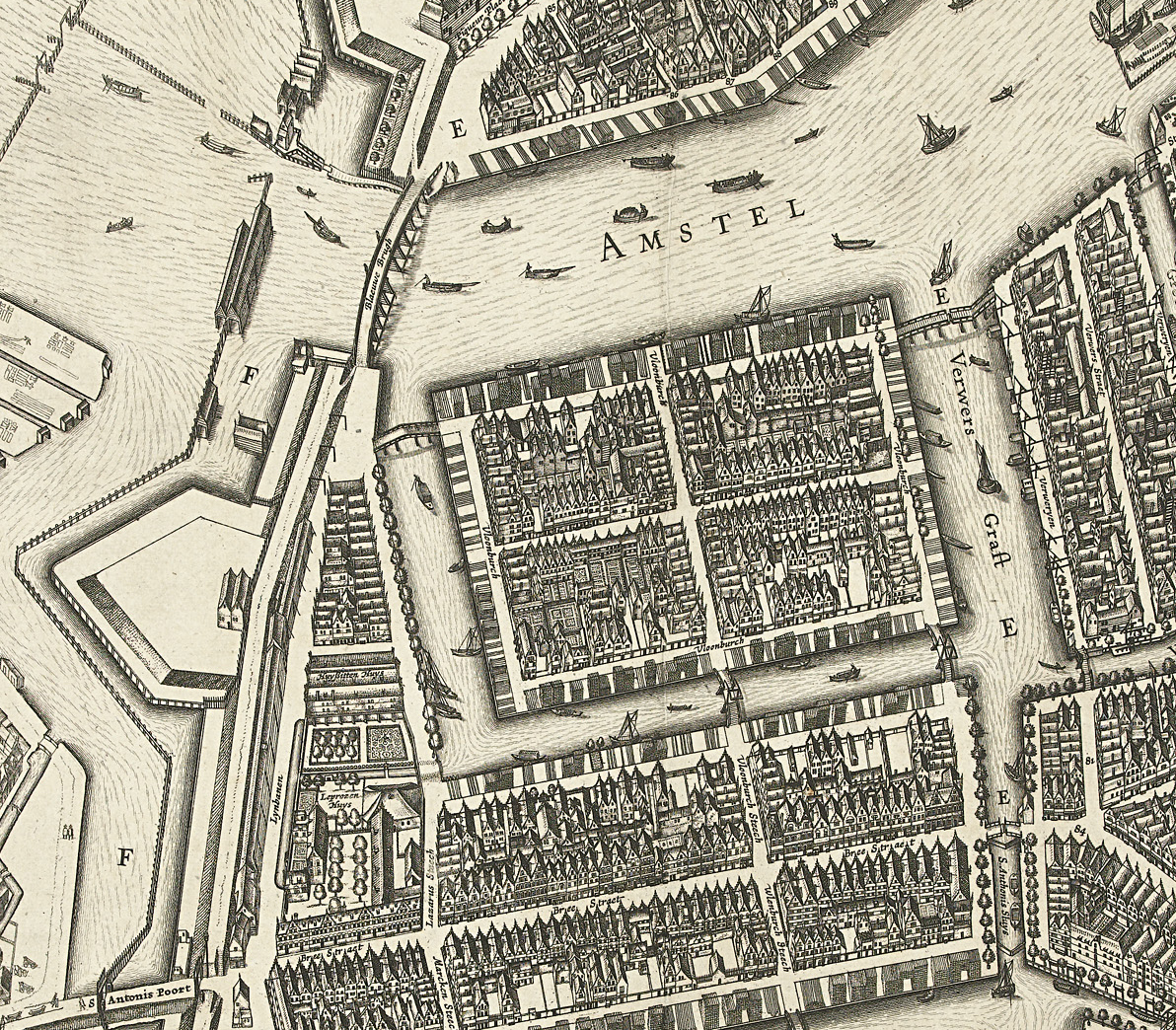 Vlooienburg in 1625. Detail van File:Balthasar Florisz. van Berckenrode - Amsterdam (1625) 2-1.jpg.